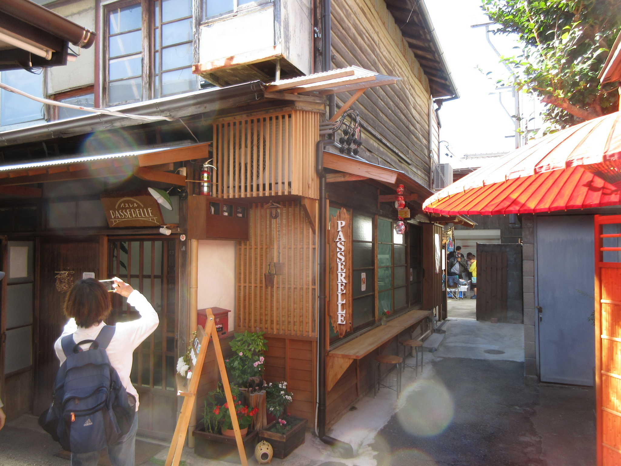 松應寺横丁にぎわい市（岡崎市松本町）